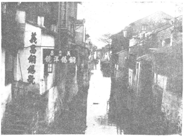 民國時期無錫城內直河一景，商店鱗次櫛比、沿河而開，形成“水弄堂”。